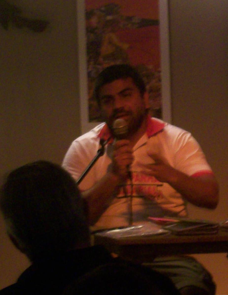 Washington Cucurto, escritor argentino.